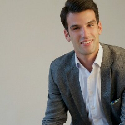 U.L.